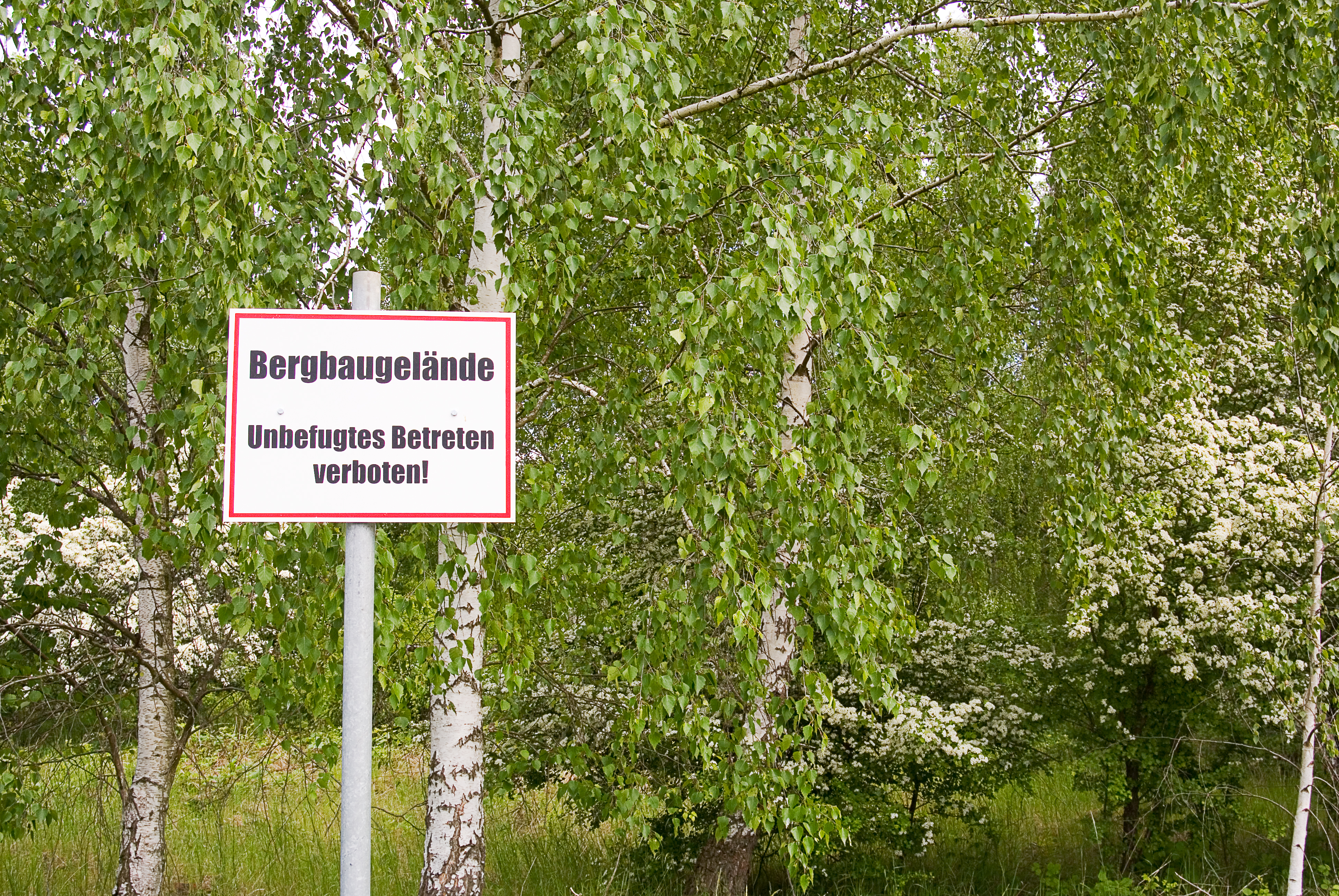 Landschaft um Restloch Zechau, Naturschutzgebiet ist abgesperrt!